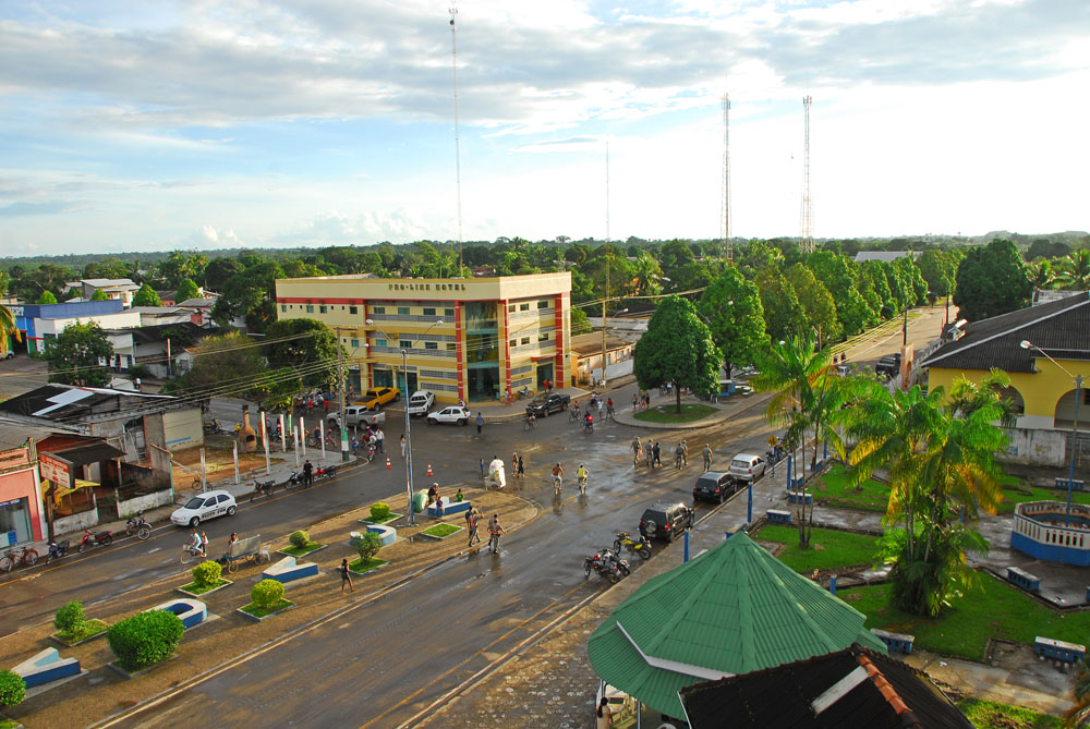 Avenida Antonio Frota - Tarauaca